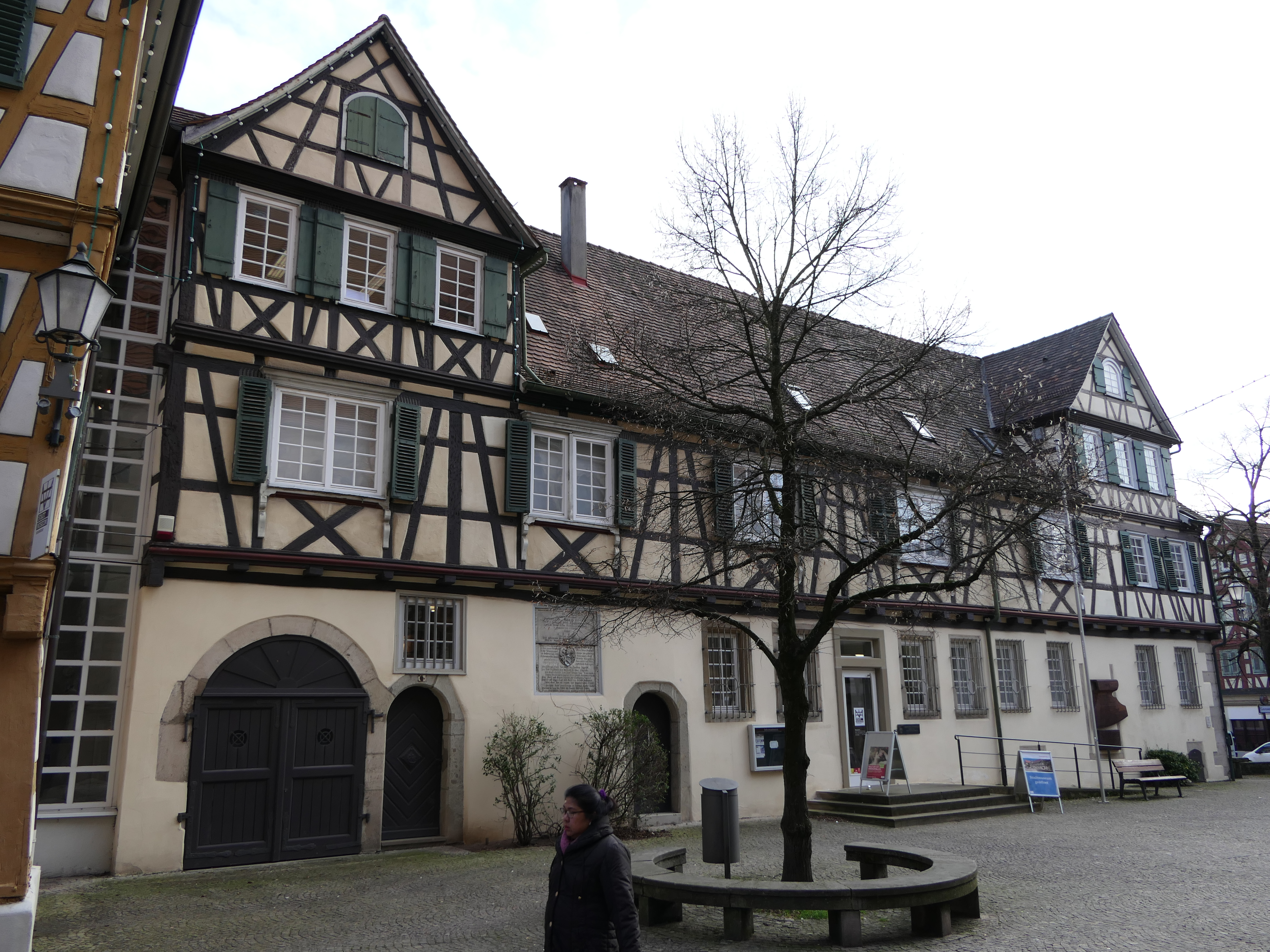 Das Gebäude "Kirchplatz 9" (ehemalige Lateinschule) in Schorndorf, Rems-Murr-Kreis.